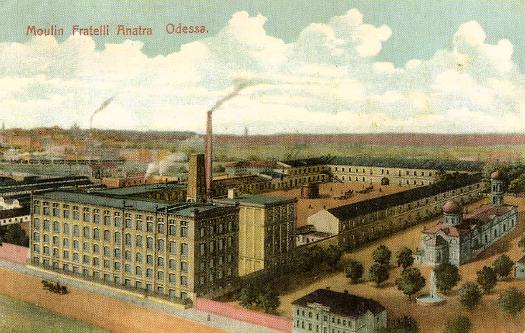 Почтовая открытка с изображением мельницы фирмы «Братья Анатра» в Одессе